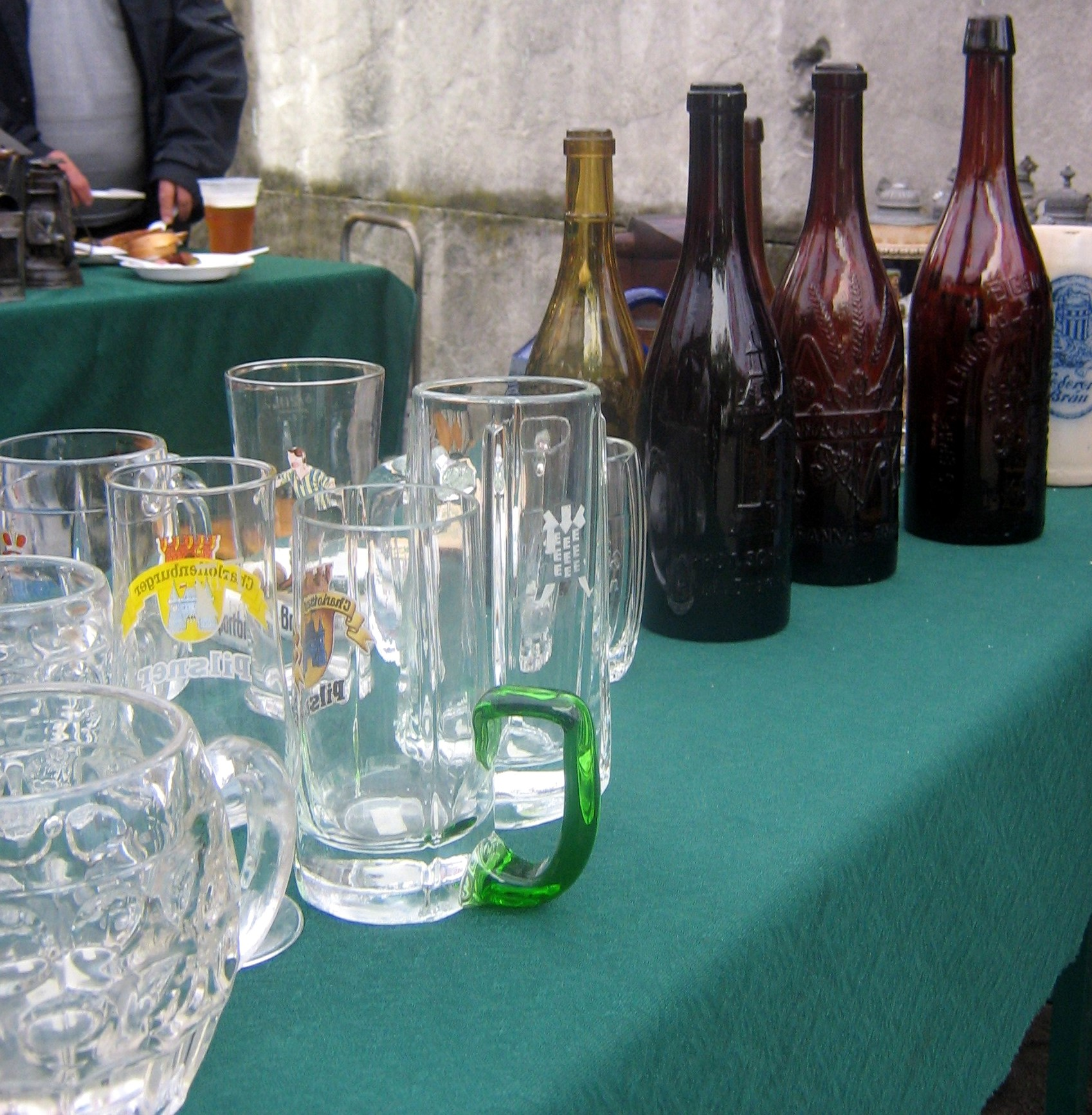 Eksponaty na giełdzie